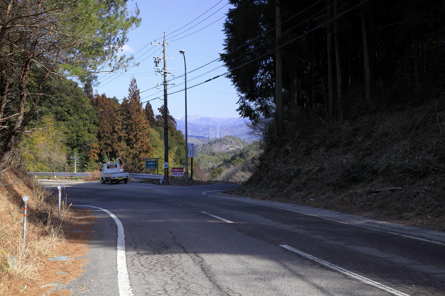 小村峠（こむれとうげ）（豊田市東郷町、2012年（平成24年）2月）